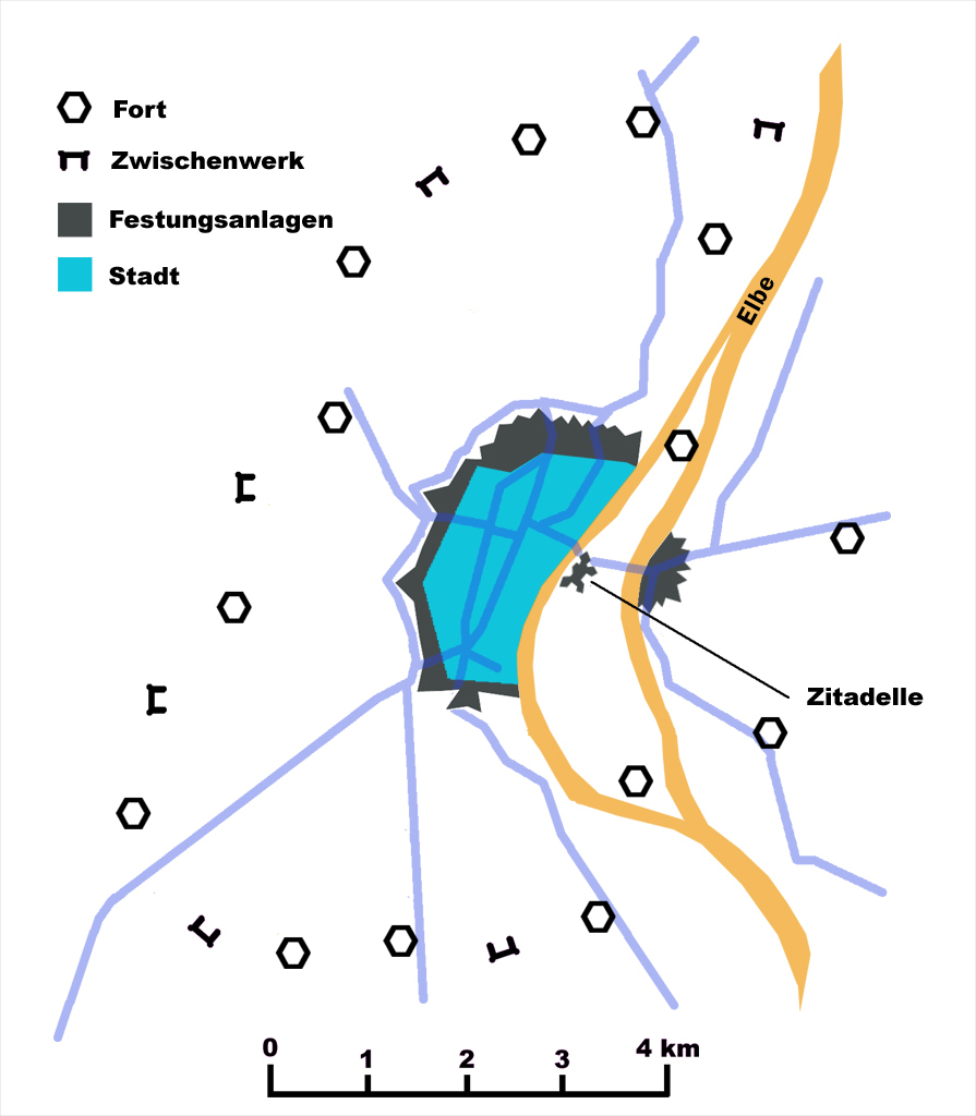 Forts um Magdeburg